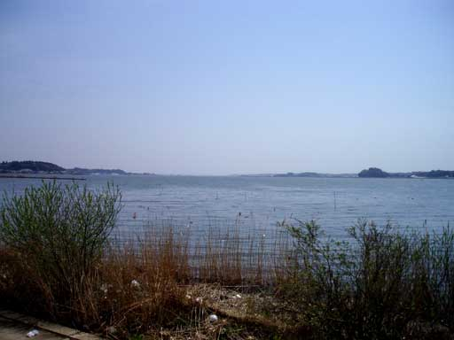 石岡市高浜より霞ヶ浦を望む。2005年4月。